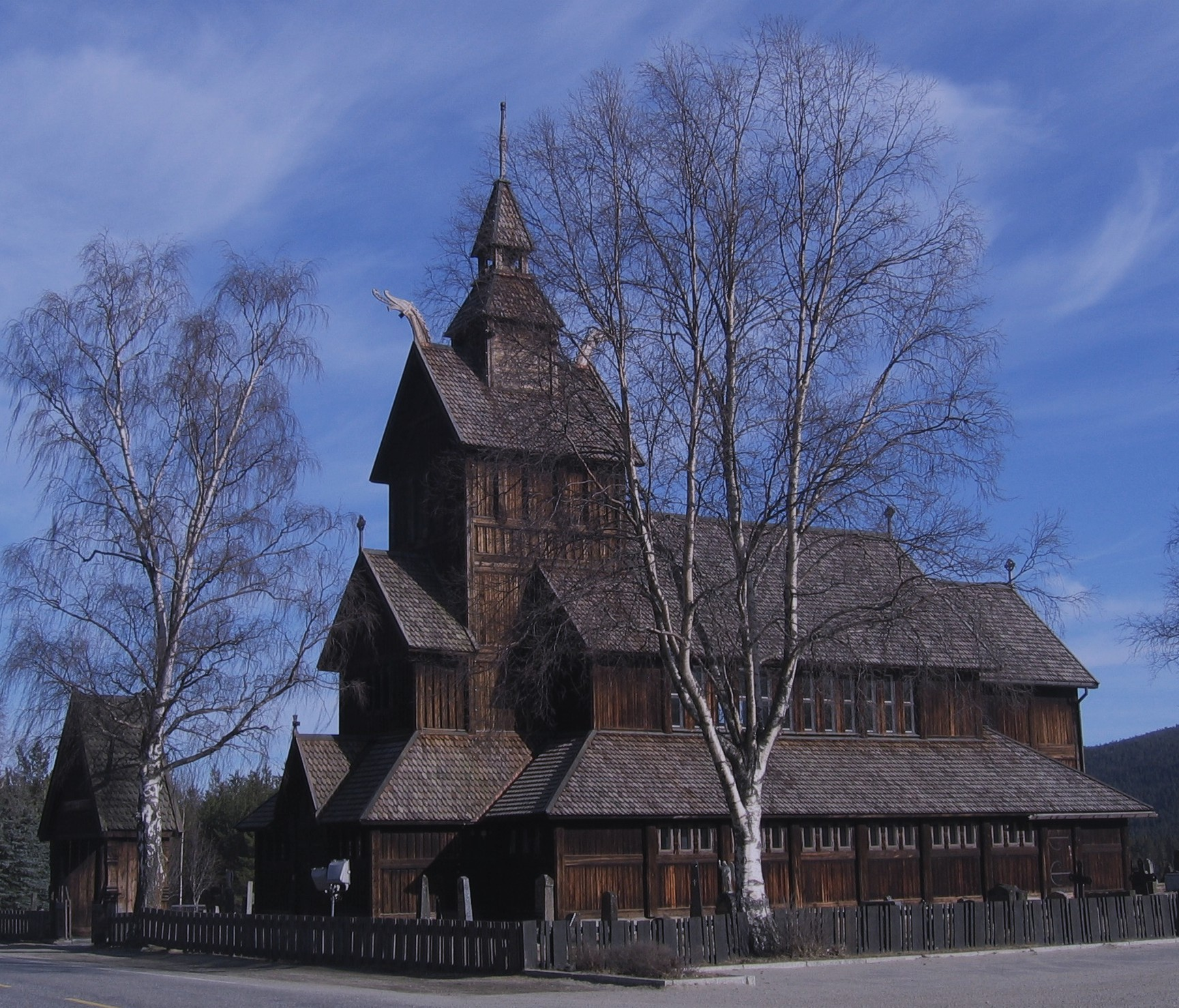 Uvdal church Uvdal kirke i dragestil.